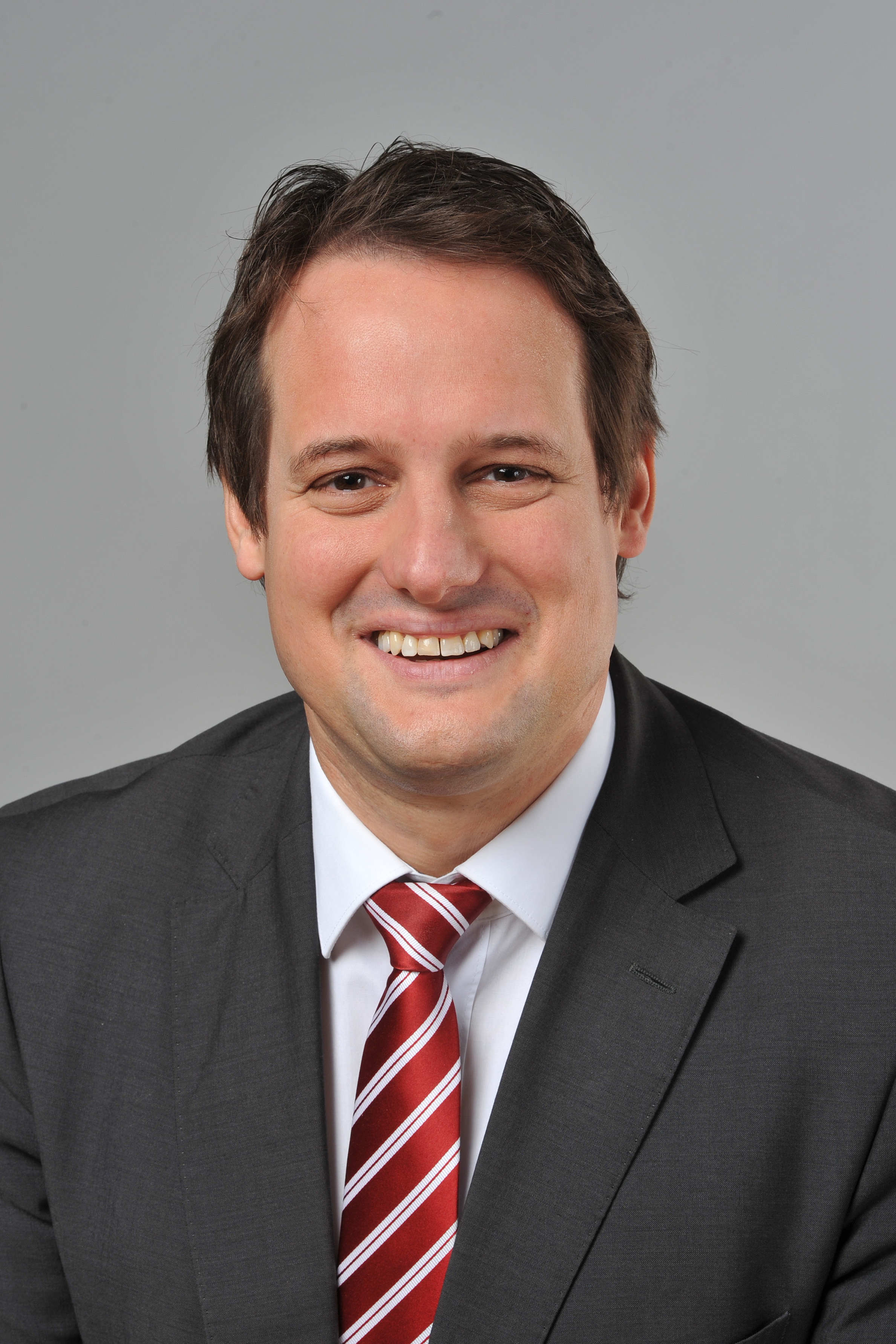 Landtagsprojekt Nordrhein-Westfalen 27. - 29. November 2013 Thorsten Schick